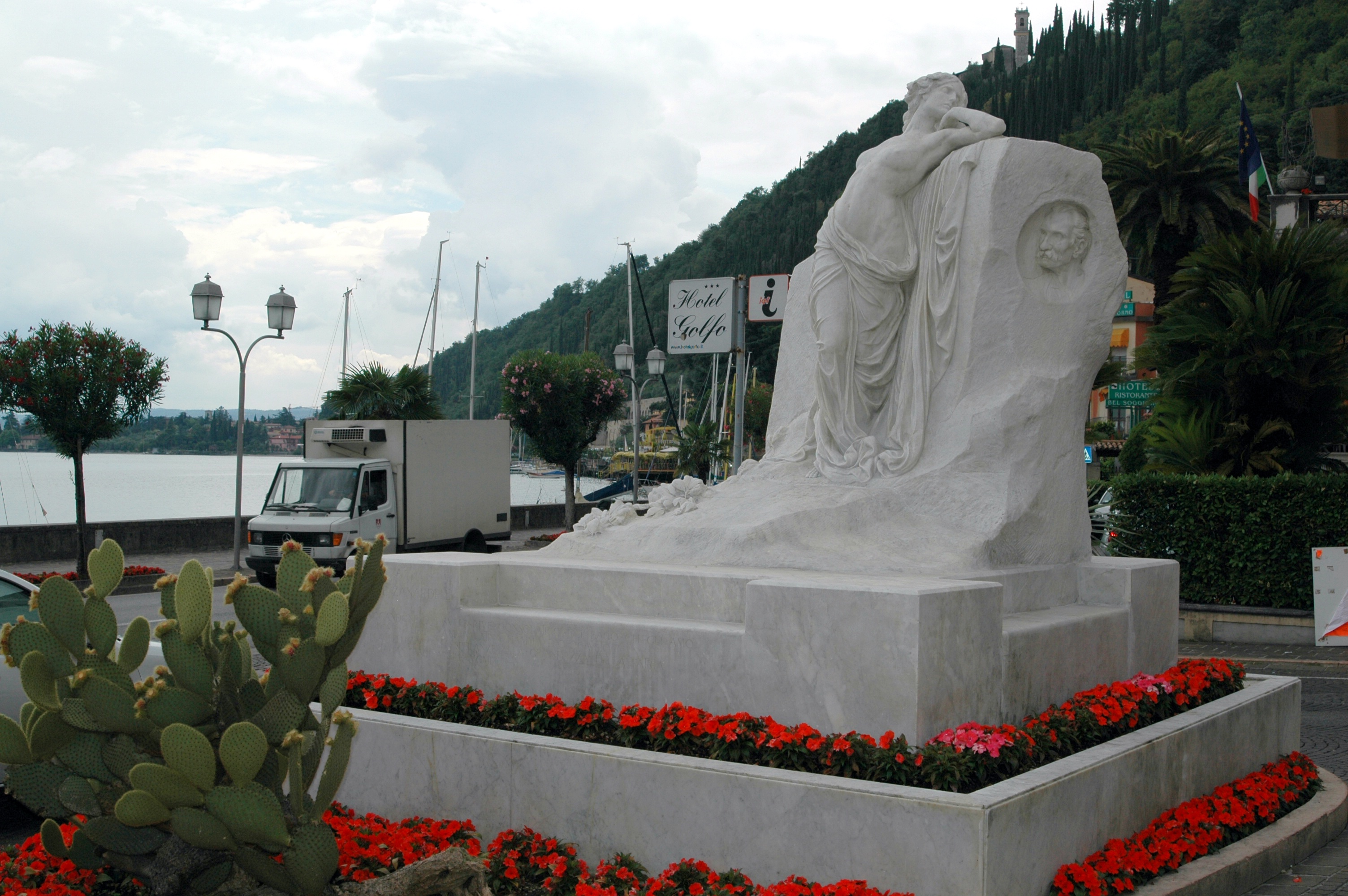 Toscolano-Maderno, Lombardia, ItaliaToscolano-Maderno